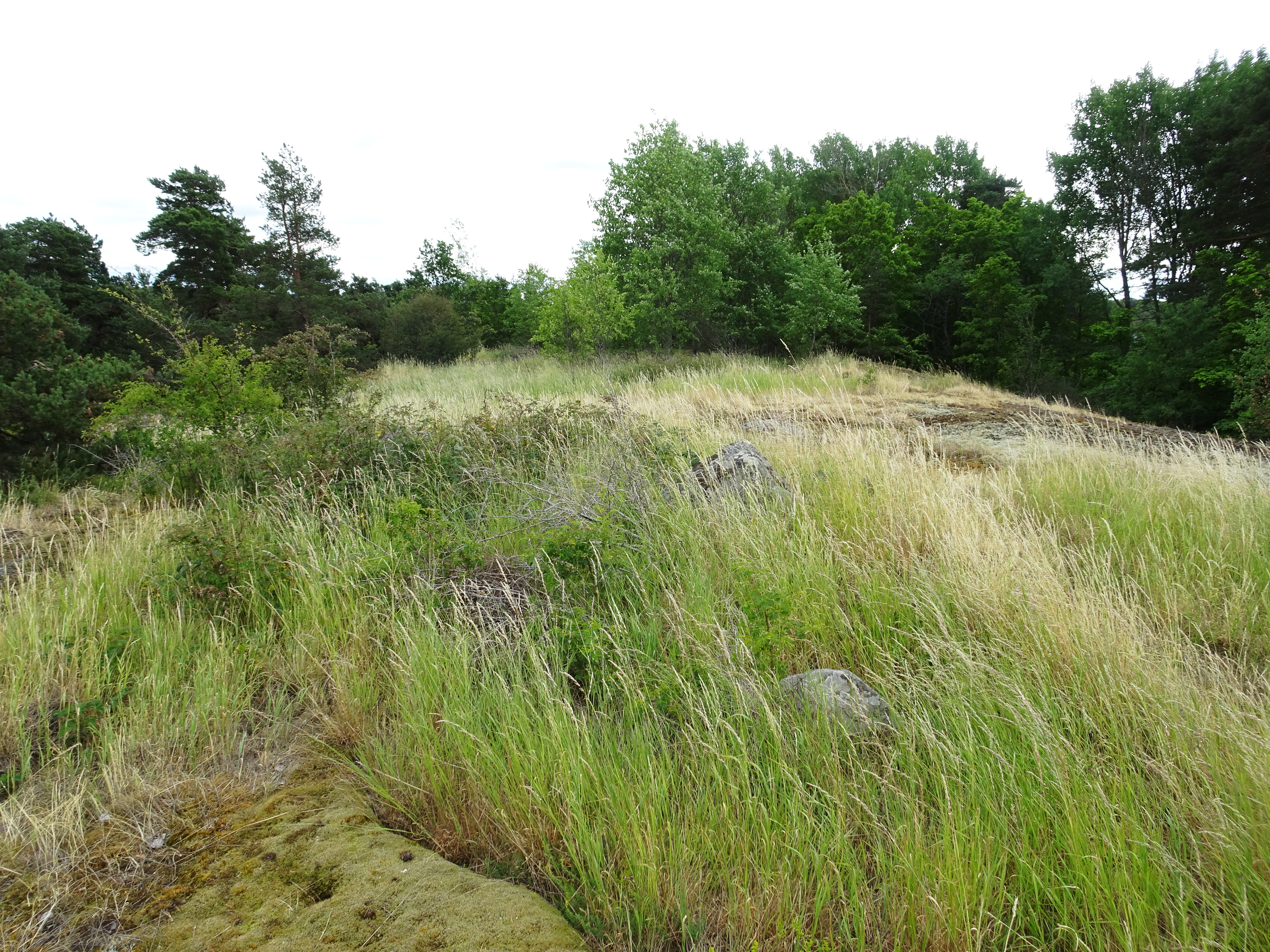 Kvarnbacken, Veddesta. Borttagen väderkvarn, omnämnd åren 1625-1870. Hörde till Veddesta gård